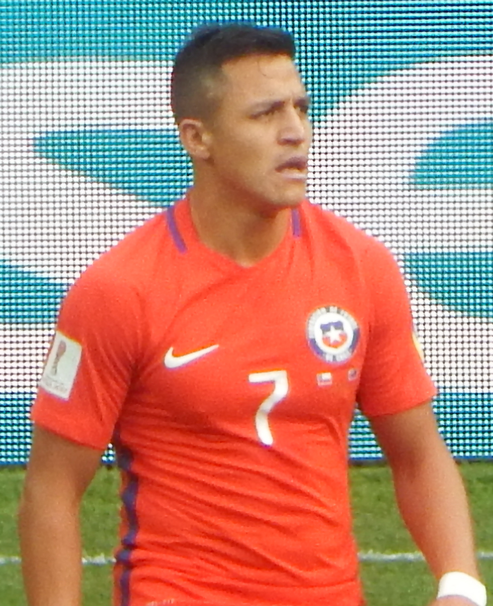 Алексис Санчес Матч Чили – Австралия